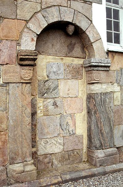 Almind Kirke (Viborg Kommune), Sydportal